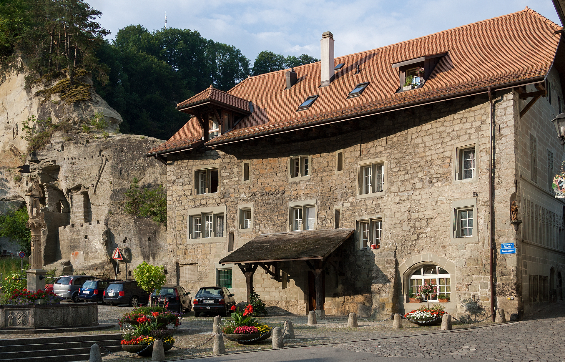 Place des Forgeron in Fribourg